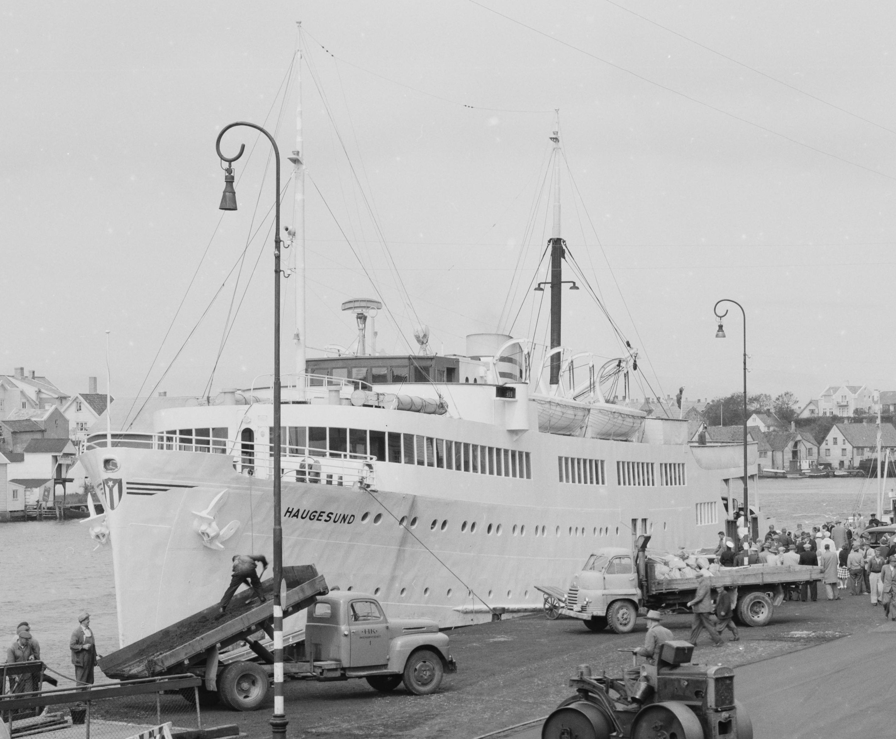 Bildet er hentet fra Nasjonalbibliotekets bildesamling. Anmerkninger til bildet var: Fotograf: ÅM Haugesund, Haugesund, Rogaland